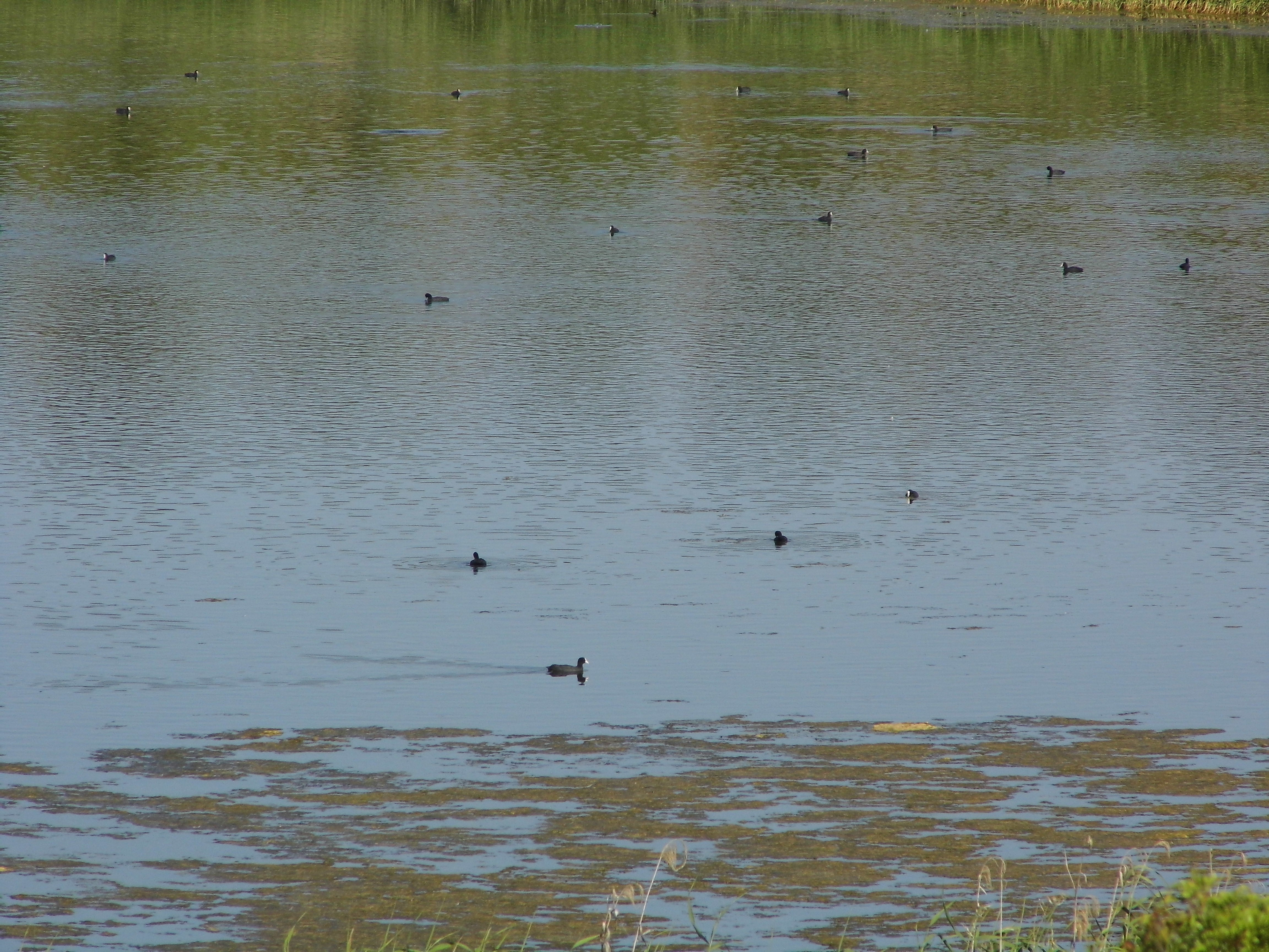 Complejo endorreico de Espera This is a photography of a Site of Community Importance in Spain with the ID: ES0000026. Natura2000 entry, EEA entry